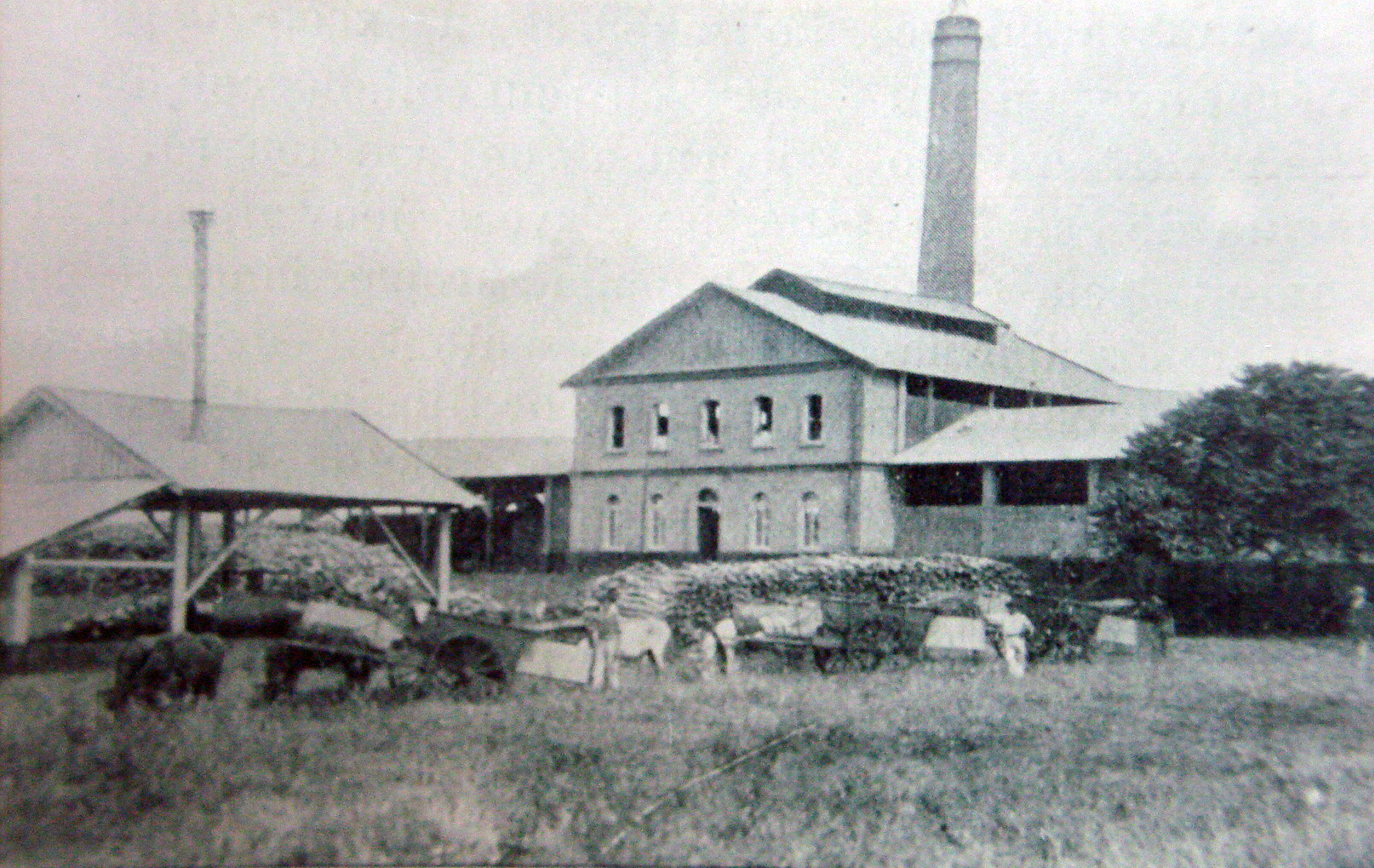 Engenho Central dec 30